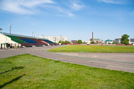 Стадион "Олимп"